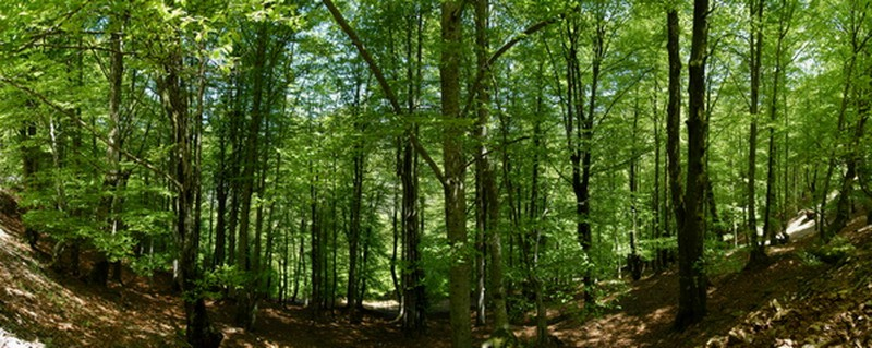 Hayas en el Monte Saja, Cantabria (España) © jlgomezlinares